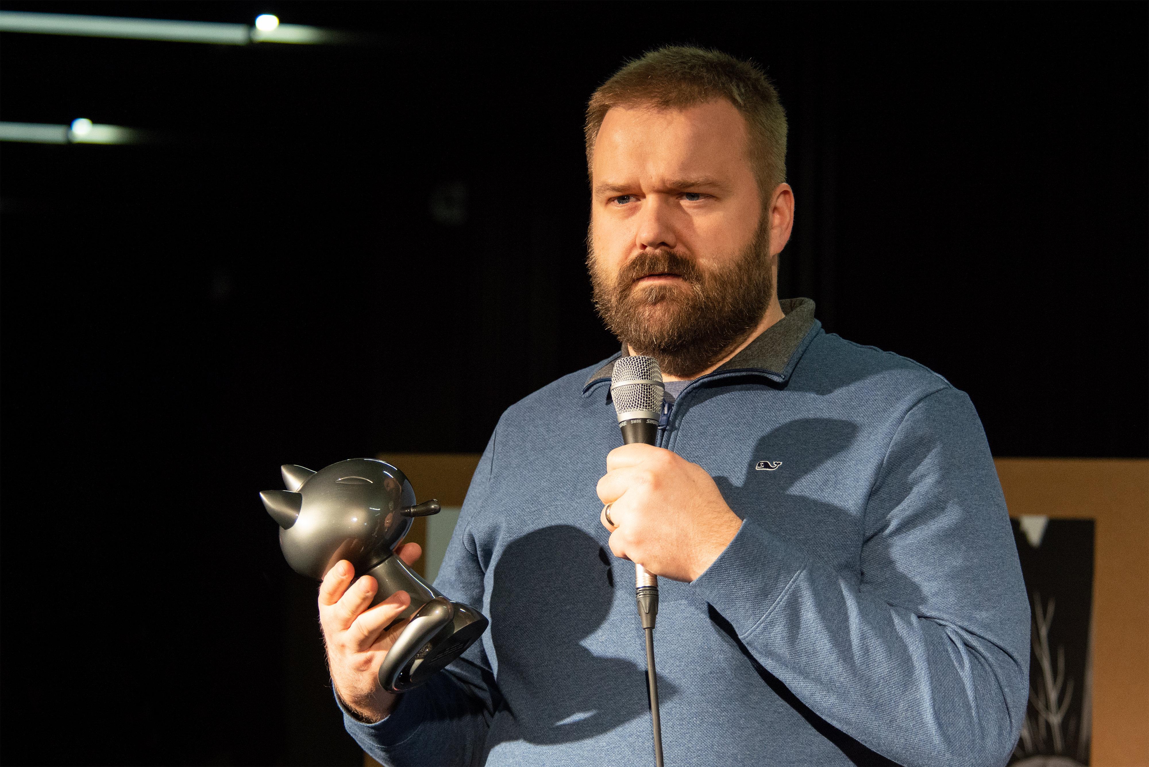 Remise d'un Fauve d'honneur au scénariste américain Robert Kirkman au Festival International de la Bande Dessinée d'Angoulême 2020.